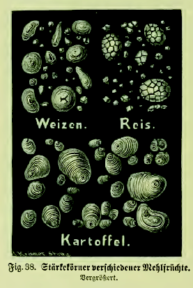 Fig. 38. Stärkekörner verschiedener Mehlfrüchte. Vergrößert.